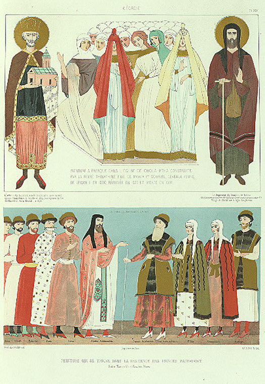 Georgie. Peintures de la residence des princes Maghaladze.